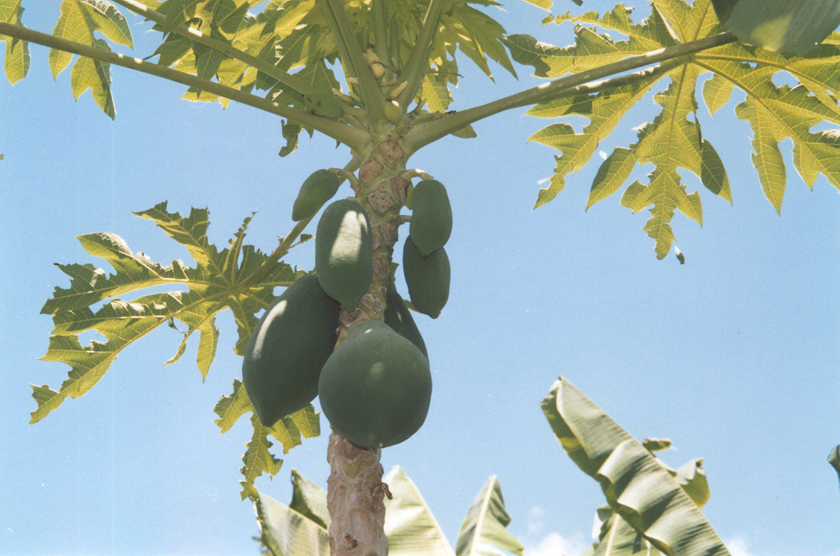 Planta de lechosa (Carica papaya), con frutos verdes poco desarrollados. Autor: Fev. Fecha: 19-08-2006. Lugar: Curiepe, Estado Miranda, Venezuela